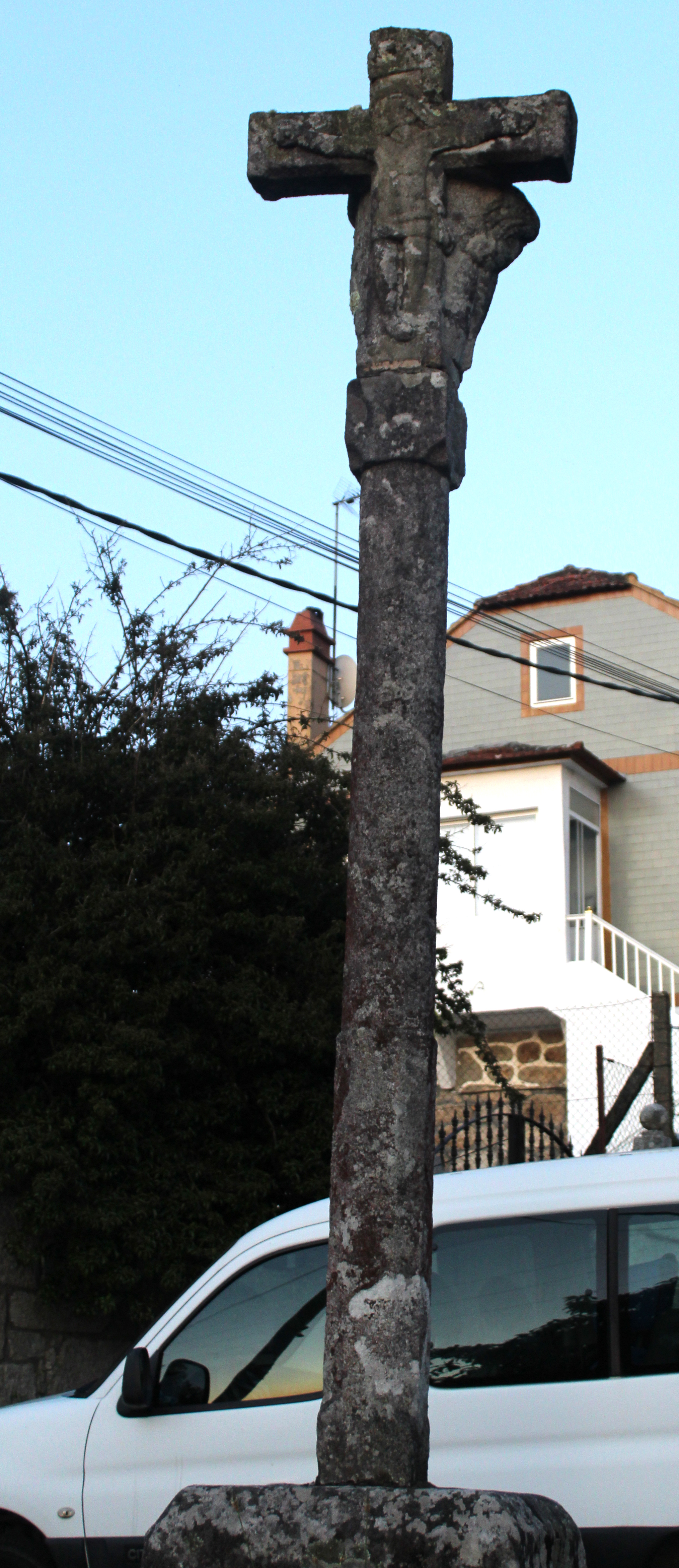 Cruceiro de Piquetes, Mañufe, Gondomar